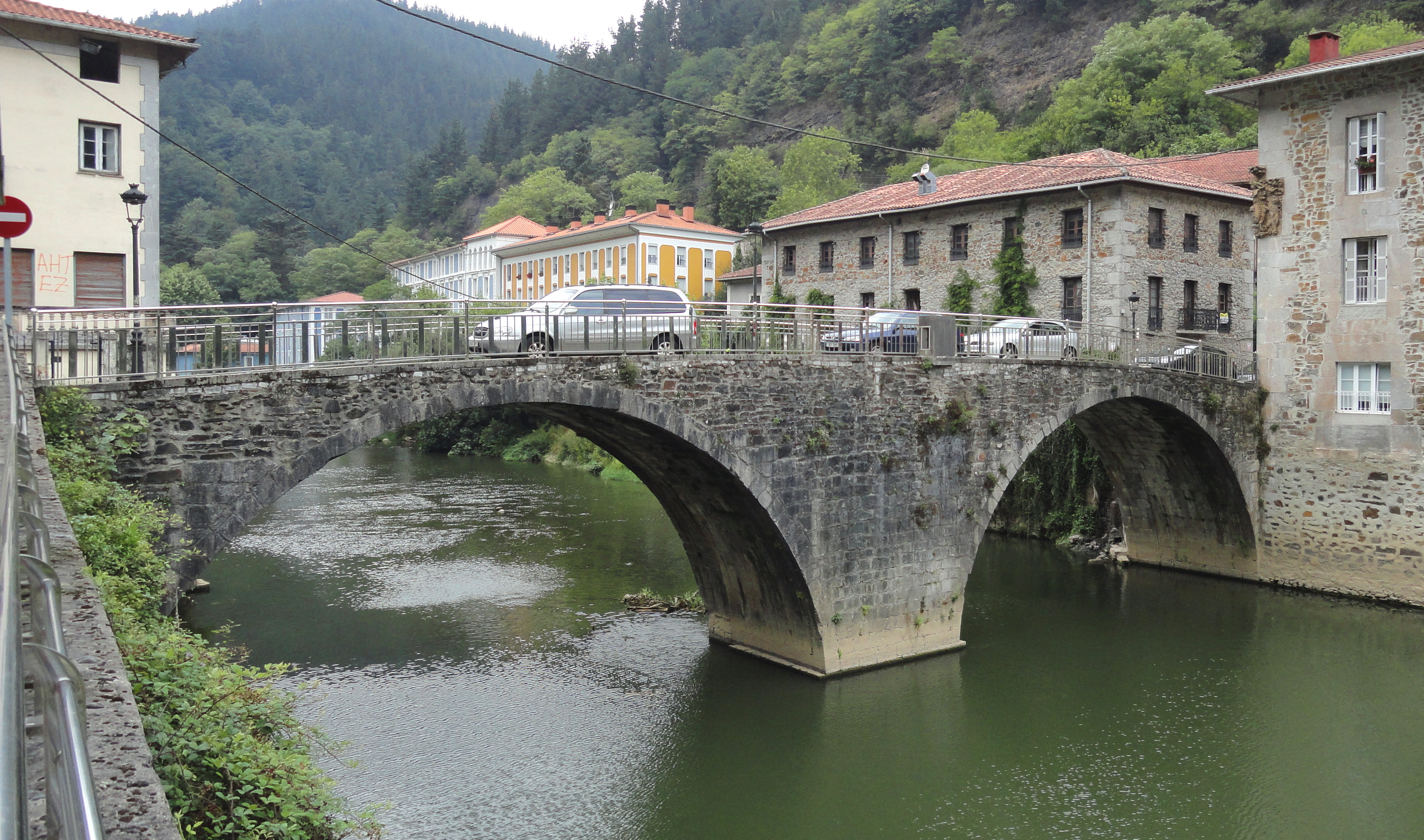 Altzolako zubia